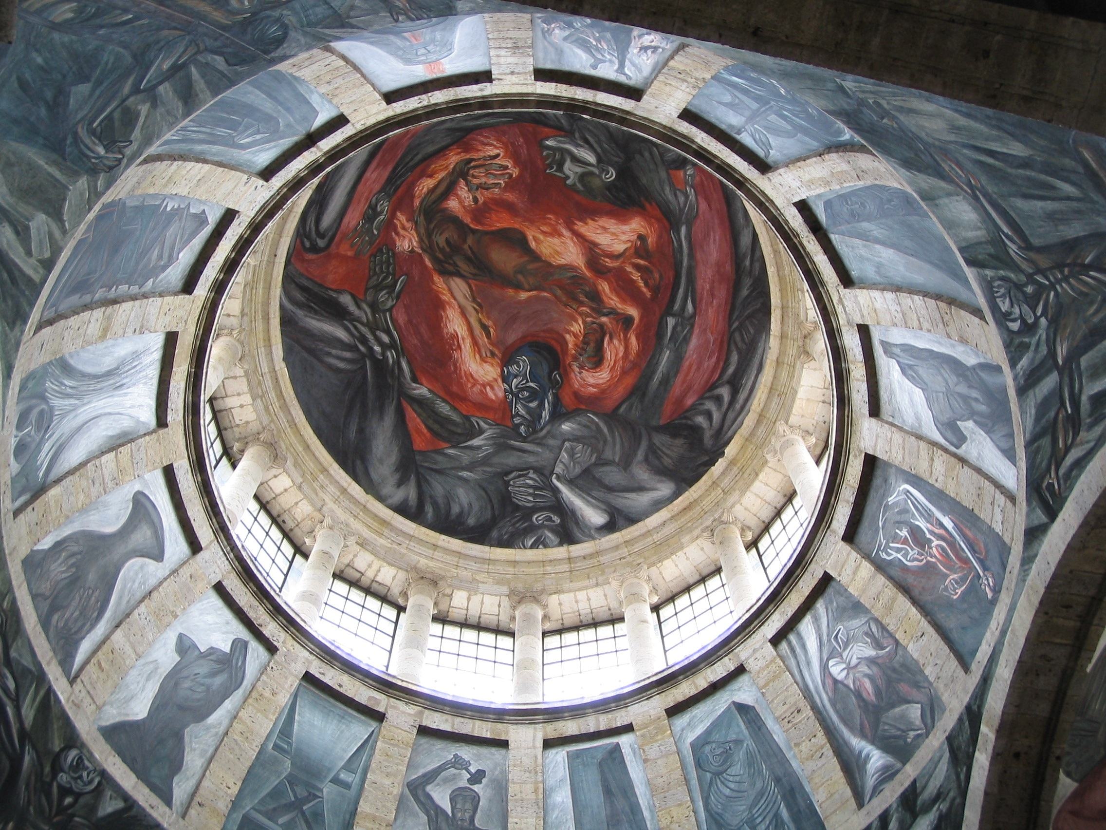 Mural painting from Orozco representing "el Hombre de Fuego", located in Hospicio Cabañas, Guadalajara, Jalisco, Mexico